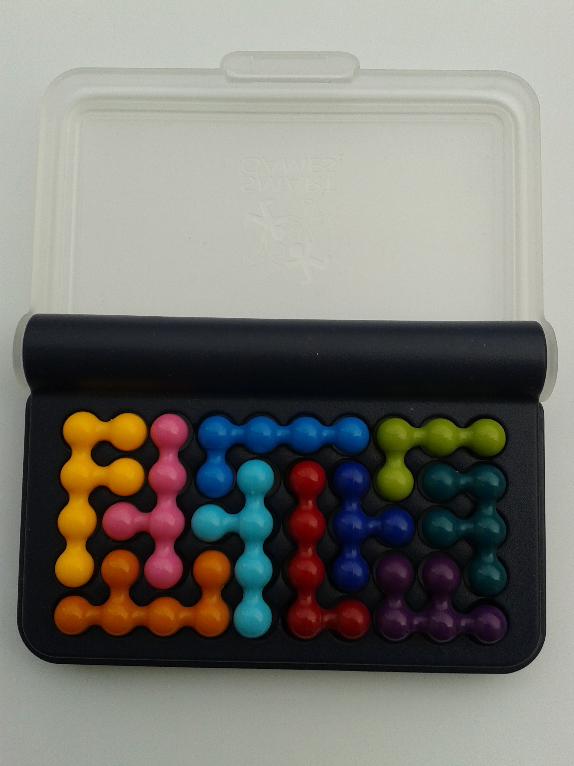 The board of the puzzle game IQFit with an example solution.